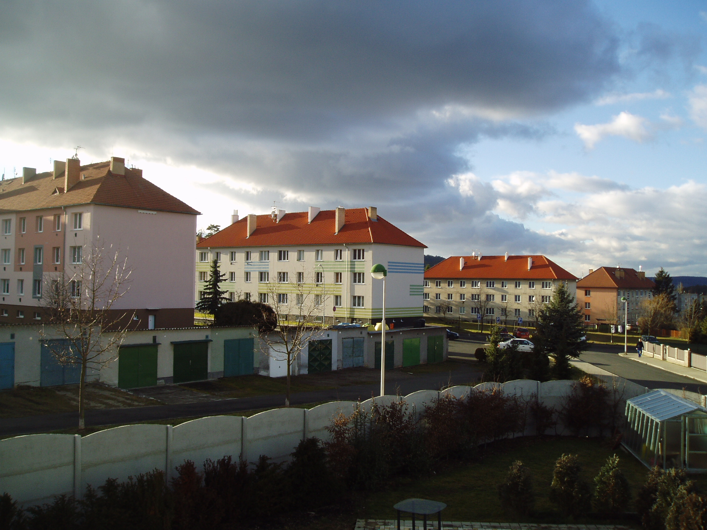 Železárenské byty